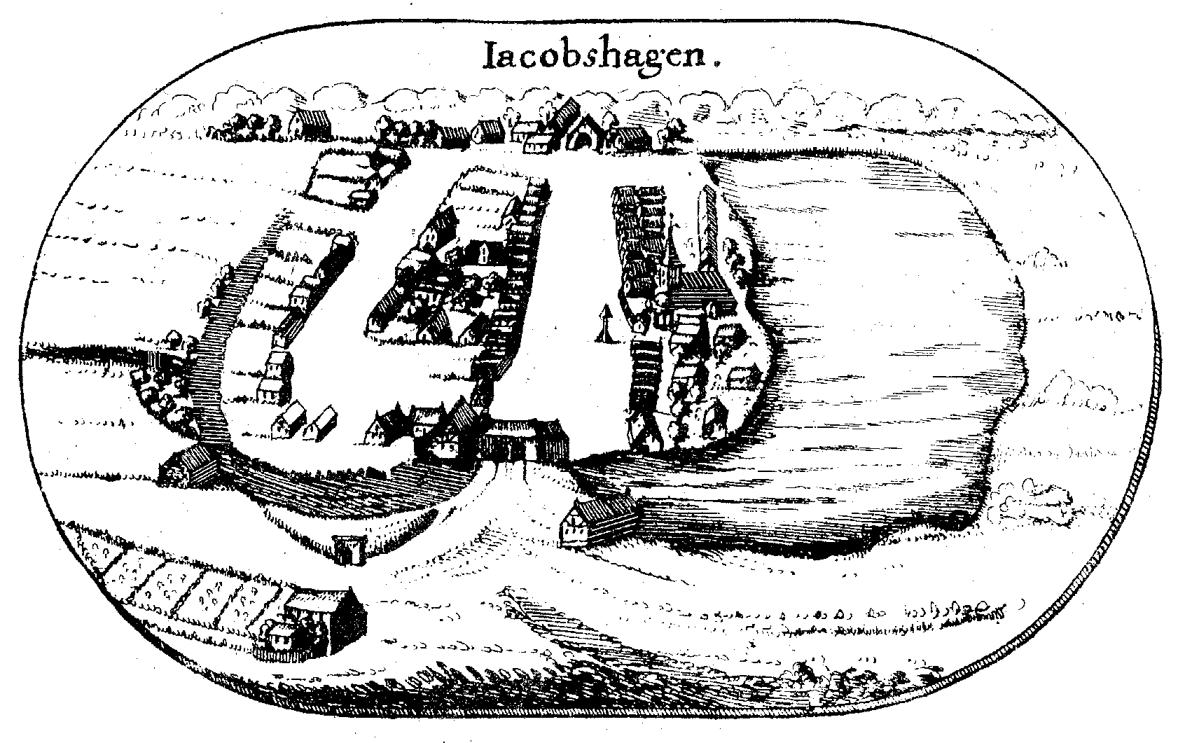 Rycina miasta Dobrzany z mapy Lubinusa - Mapa księstwa pomorskiego z 1618 roku.